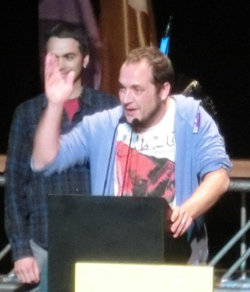 David Fernàndez Ramos, el candidat de la CUP-Alternativa d'Esquerres a les eleccions al Parlament de Catalunya 2012, durant l'acte central de campanya de la CUP-AE al Barcelona Teatre Musical el diumenge 18 de novembre de 2012.